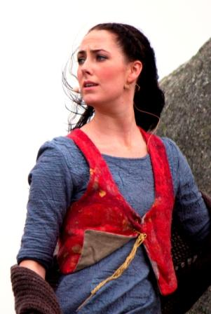 Gerd Elin Birkeland er Veslemøy under "Haugtussa-vandringa" på Knudaheio 2011.